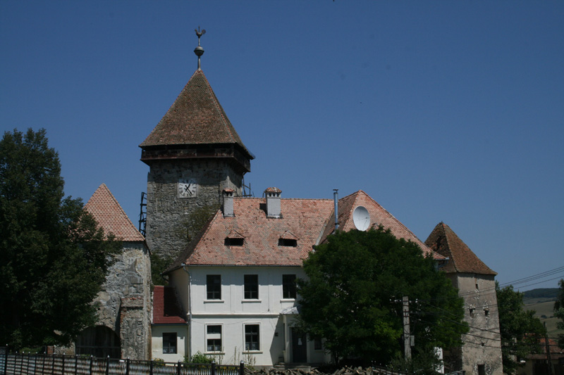 Biserica Evanghelica-Luterana din Drăuşeni